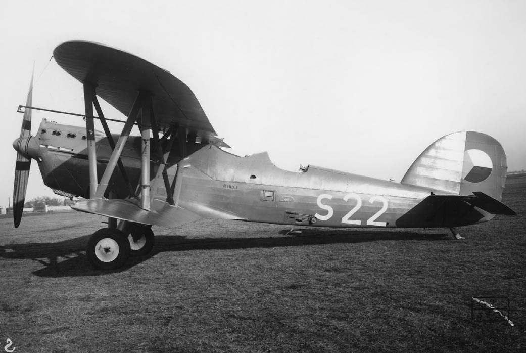 Lietadlo Aero A-100